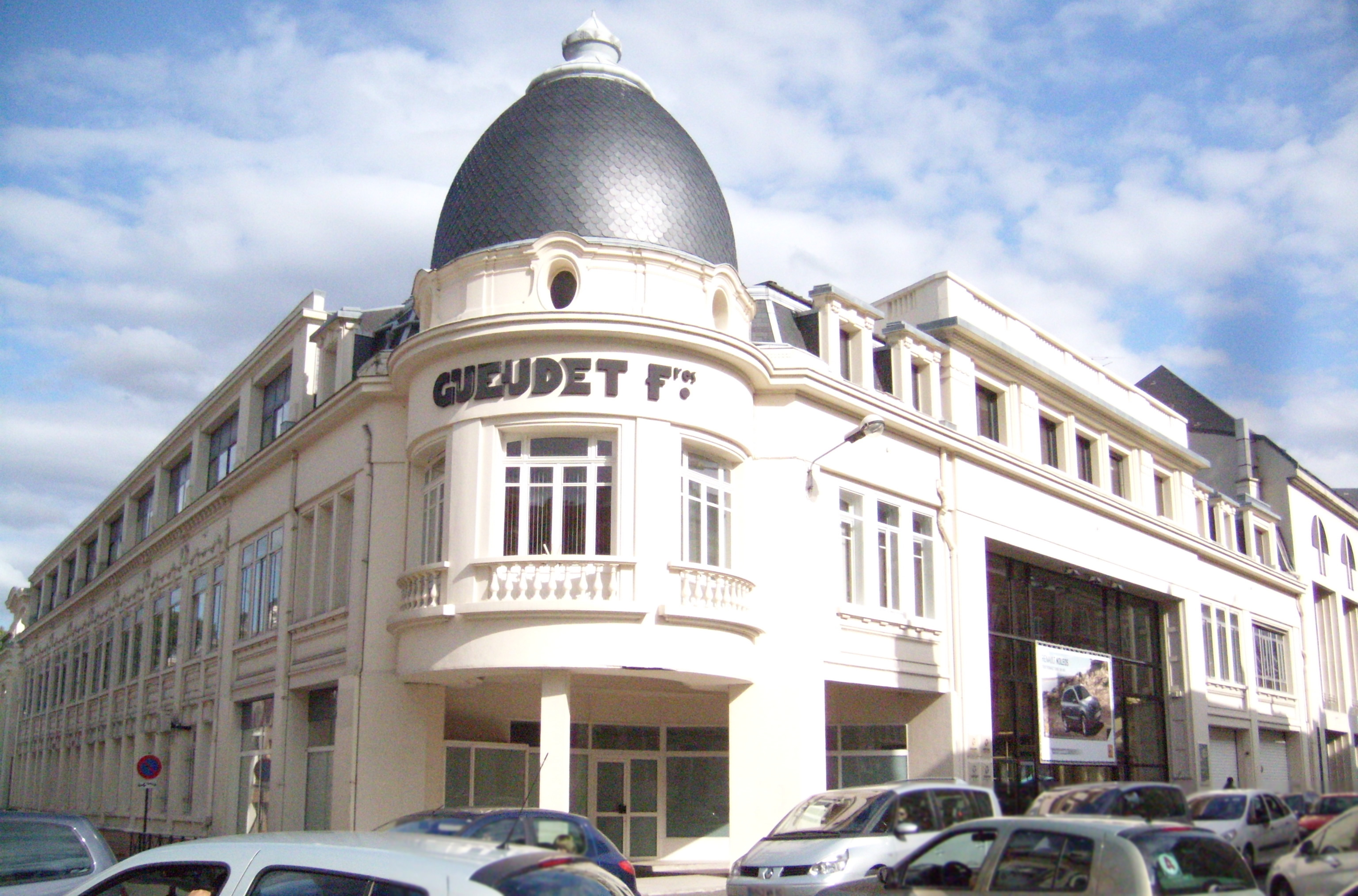 Garage Gueudet, "Palais de l'automobile" (succursale Renault), rue des Otages, Amiens (80, France). 1923, architecte inconnu. Pierre et ardoise. Anciens ateliers à gauche, hall d'exposition à droite.